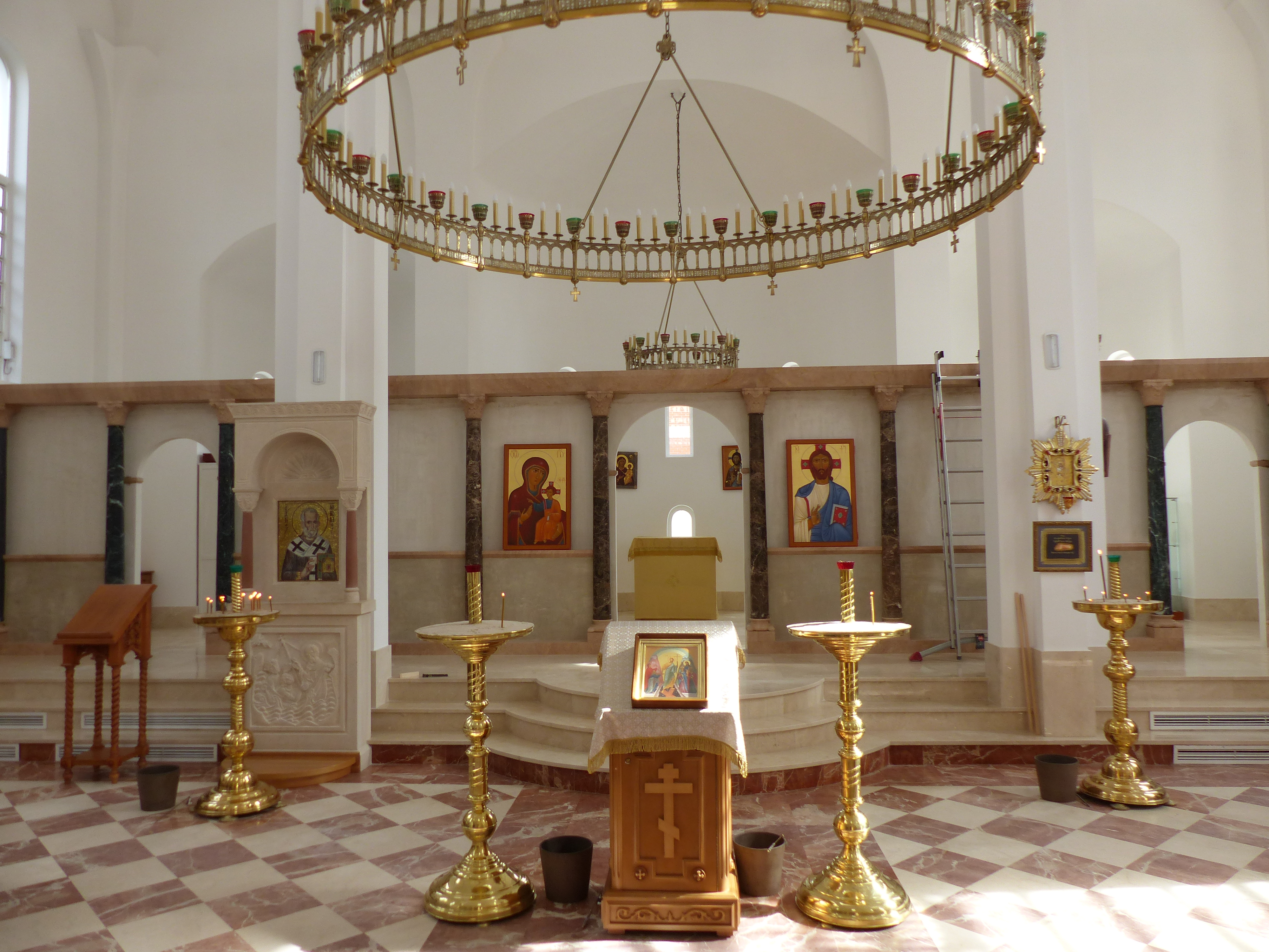 Presbiterio.